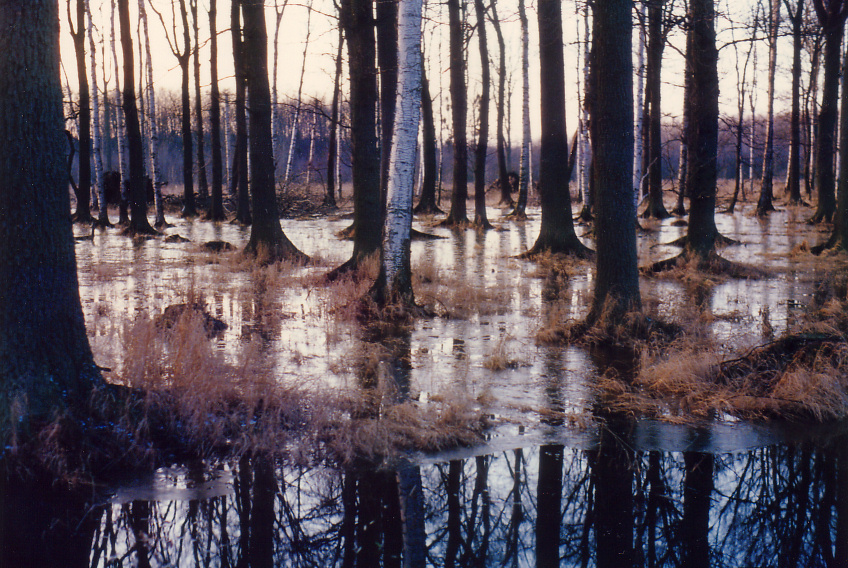 Großes Giebelmoor beim Frühjahrshochwasser 1985, Landkreis Gifhorn, Niedersachsen